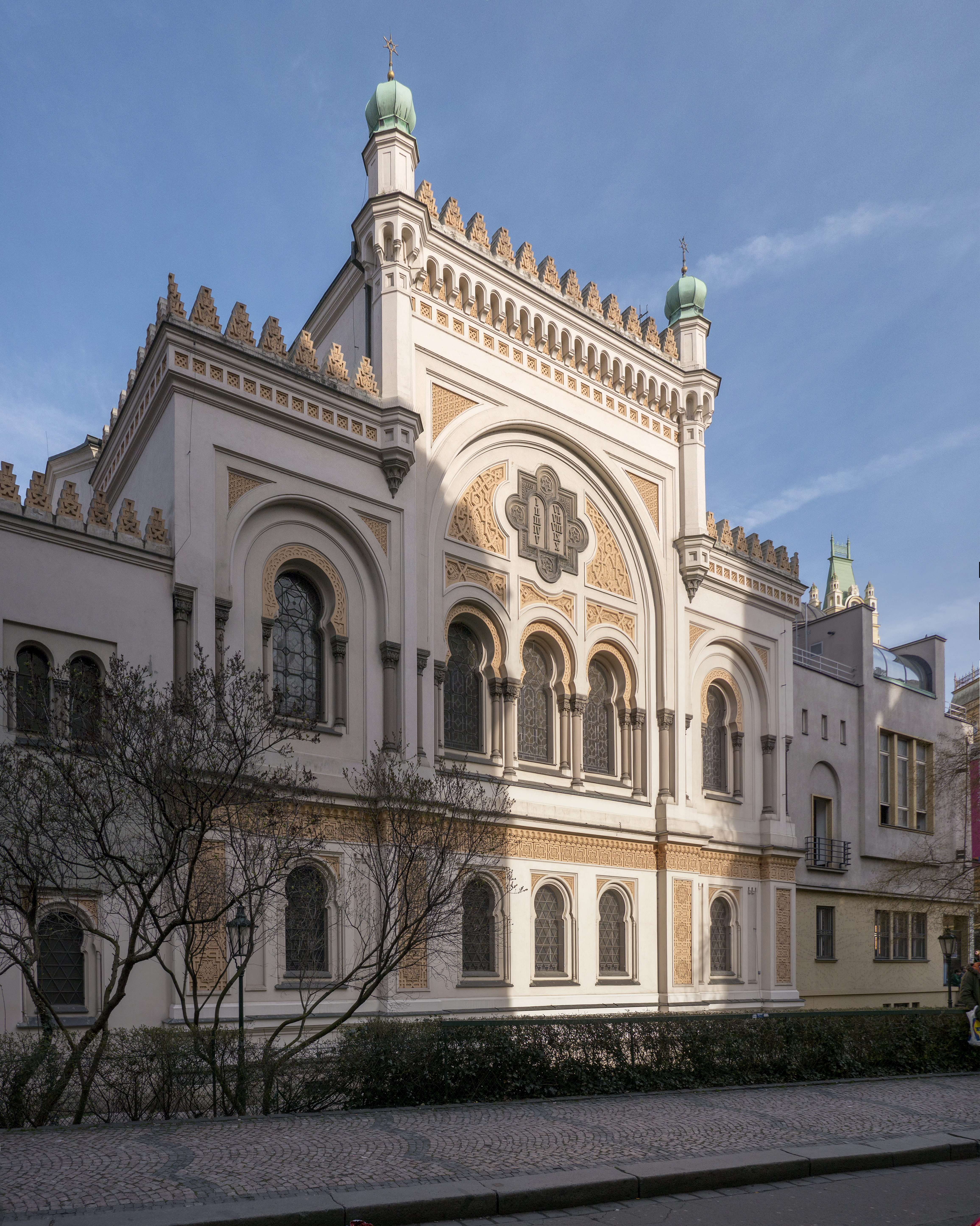 Spanish Synagogue in Prague